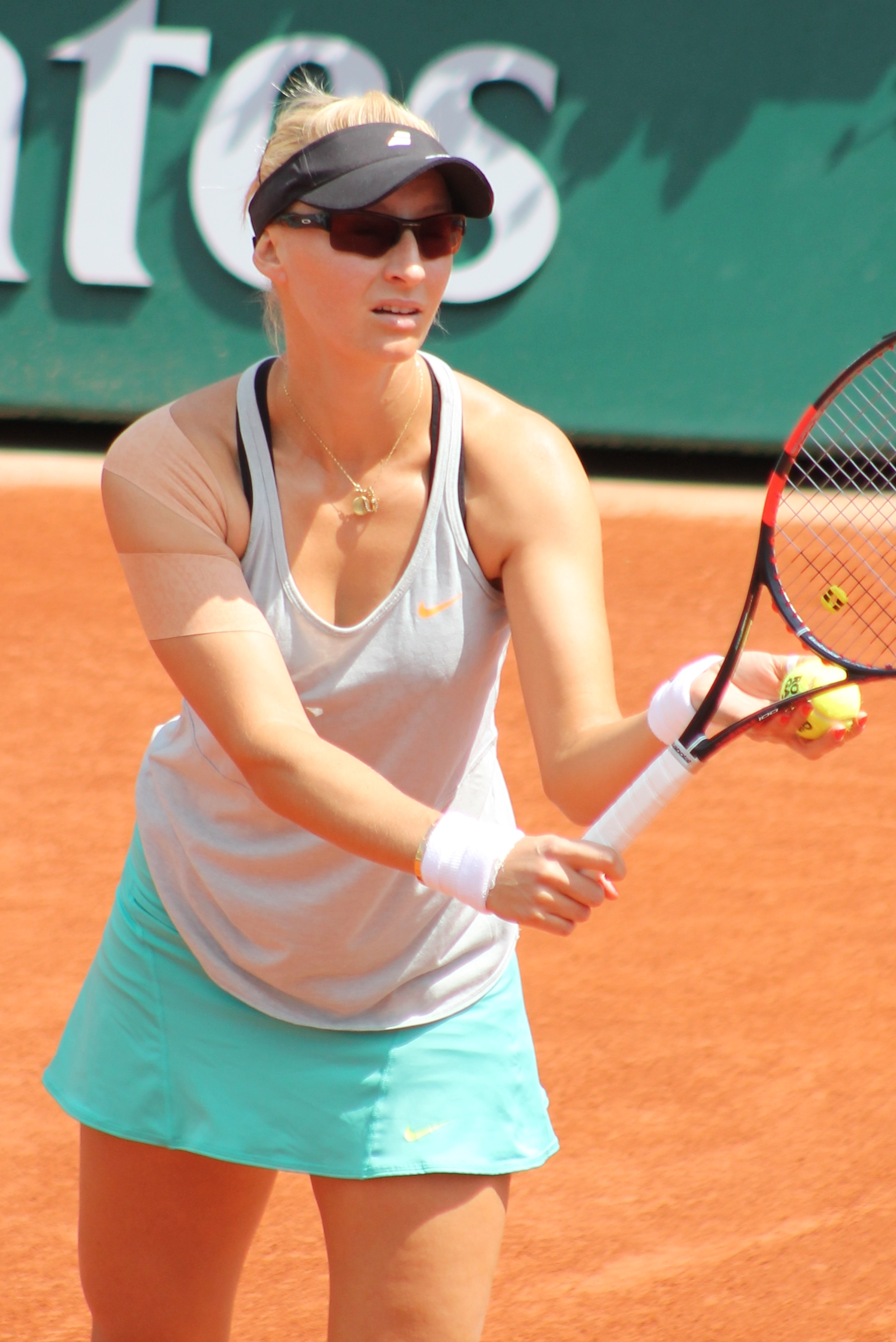 Lucic Baroni RG15 (12)